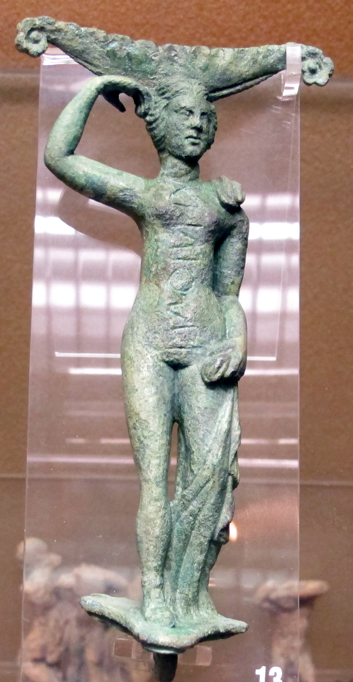 Museo territoriale del Lago di Bolsena